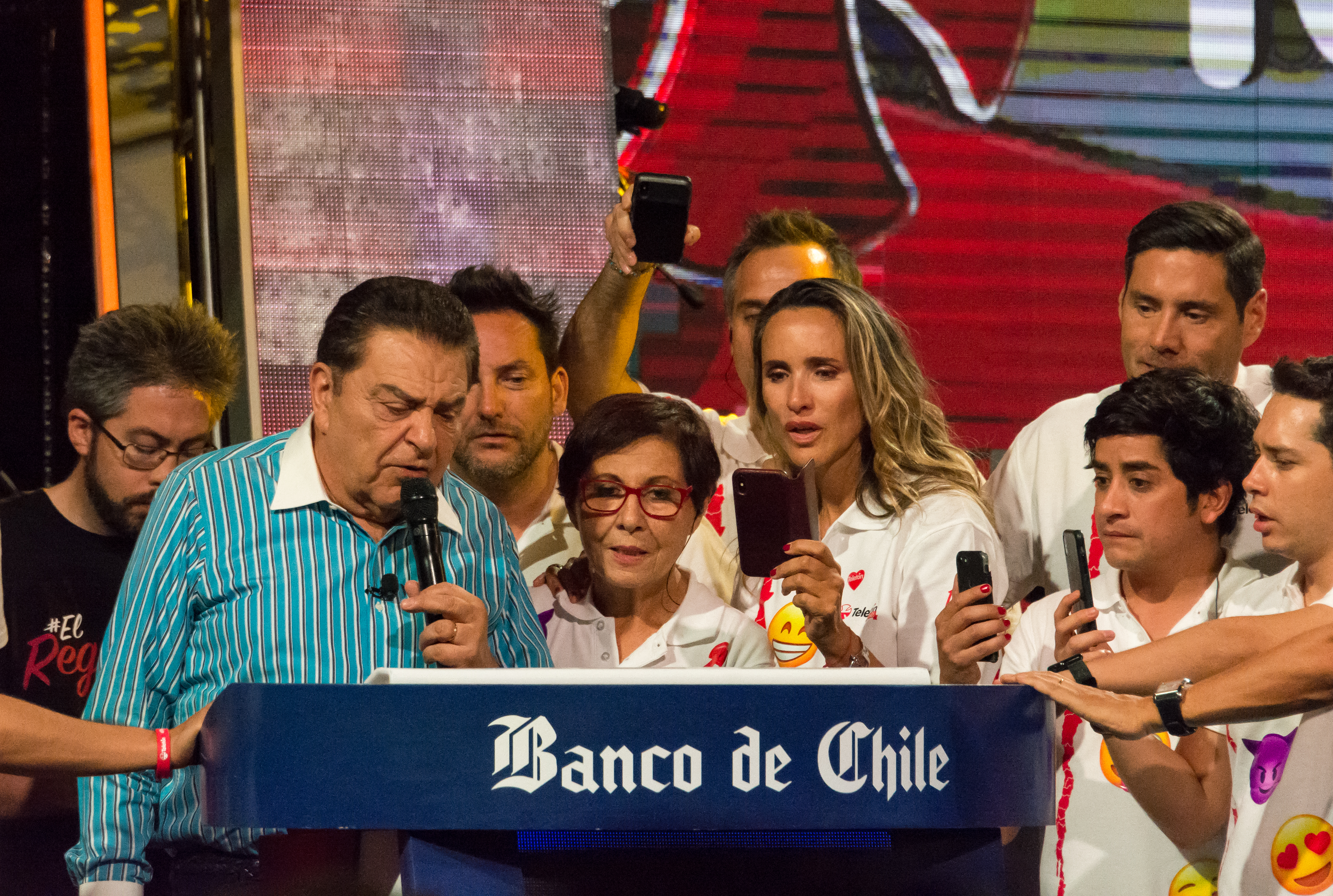 Lectura cómputo, Teletón 2018, Teatro Teletón, Santiago, Chile.